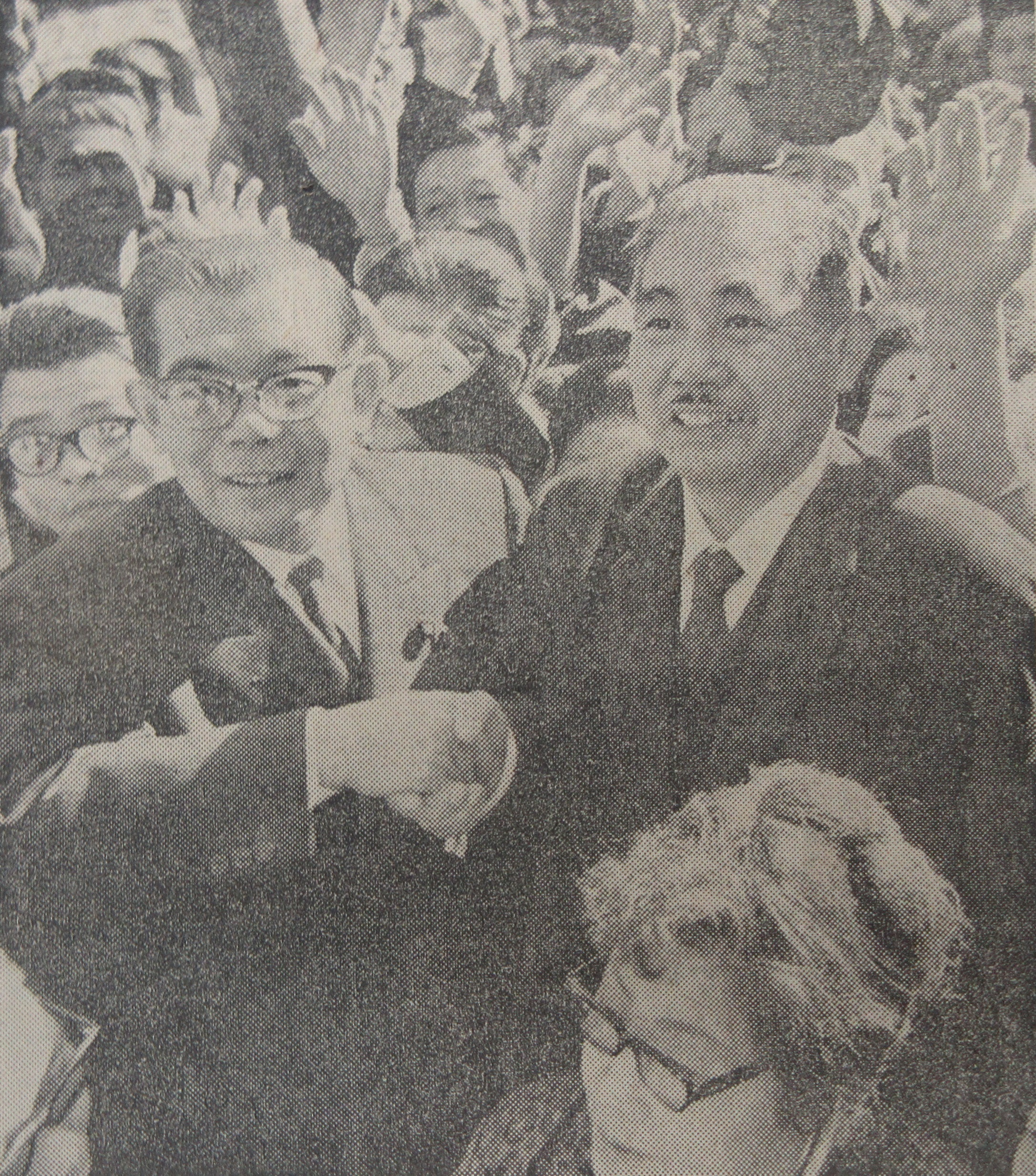 丹羽兵助（1911年5月15日 - 1990年11月2日）、丹羽久章（1914年10月31日 - 1985年8月23日）